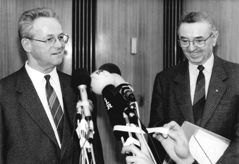 ADN-ZB Settnik 6.12.89 We Berlin: Unmittelbar nach der Sitzung des Staatsrates erläuterte dessen amtierender Vorsitzender, Prof. Dr. Manfred Gerlach (l), die Beschlüsse des Gremiums. Er teilte mit, daß er nicht für das Amt des Vorsitzenden des Staatsrates der DDR zu Verfügung stehe. Bei einer Verfassungsänderung und der eventuellen Einführung eines Präsidentenamtes werde er sich ebenfalls nicht als Kandidat bewerben. r: Hans-Joachim Heusinger, Minister der Justiz.